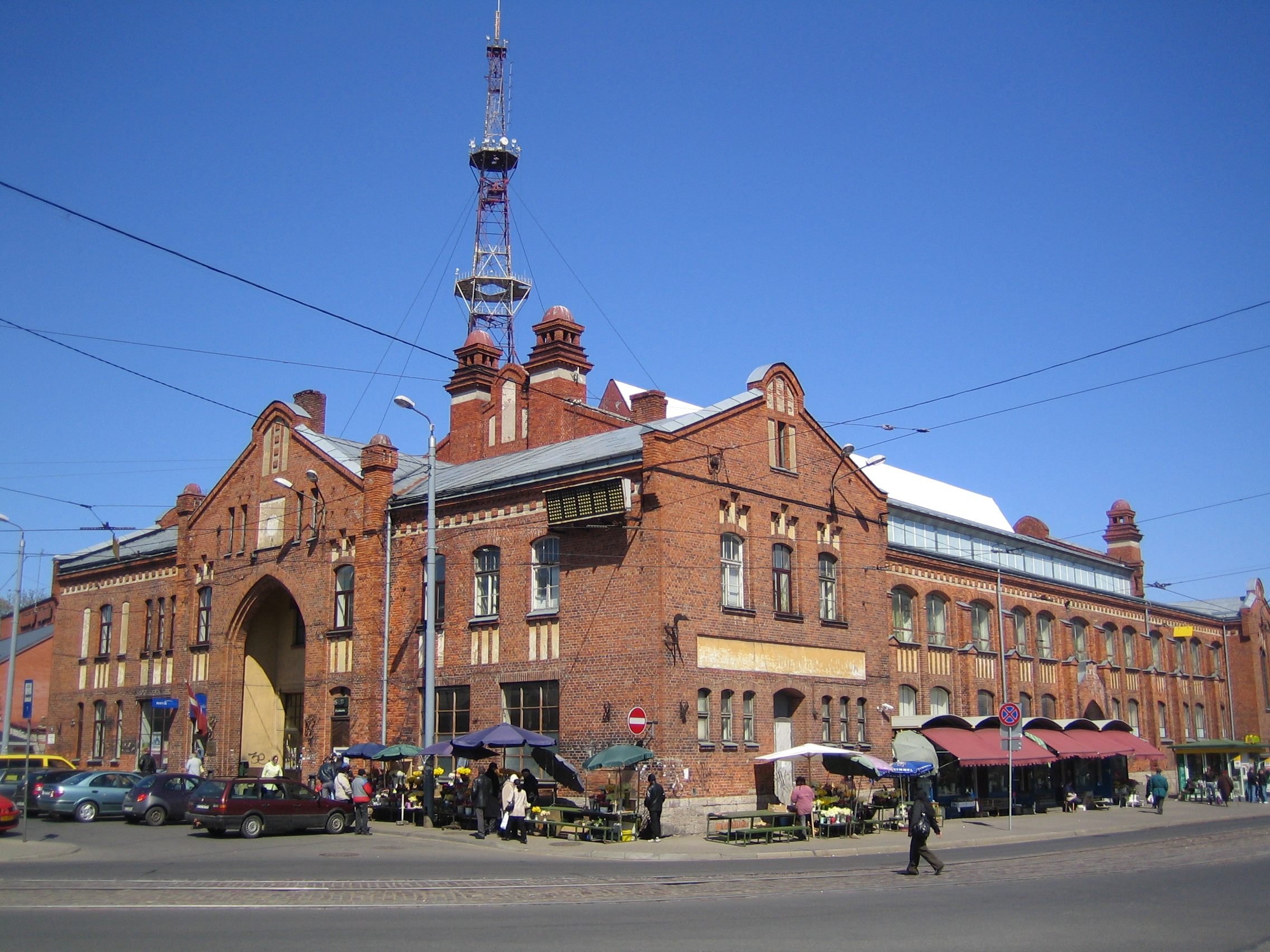 Agenskalns_marketplace (Агенскалнский рынок)